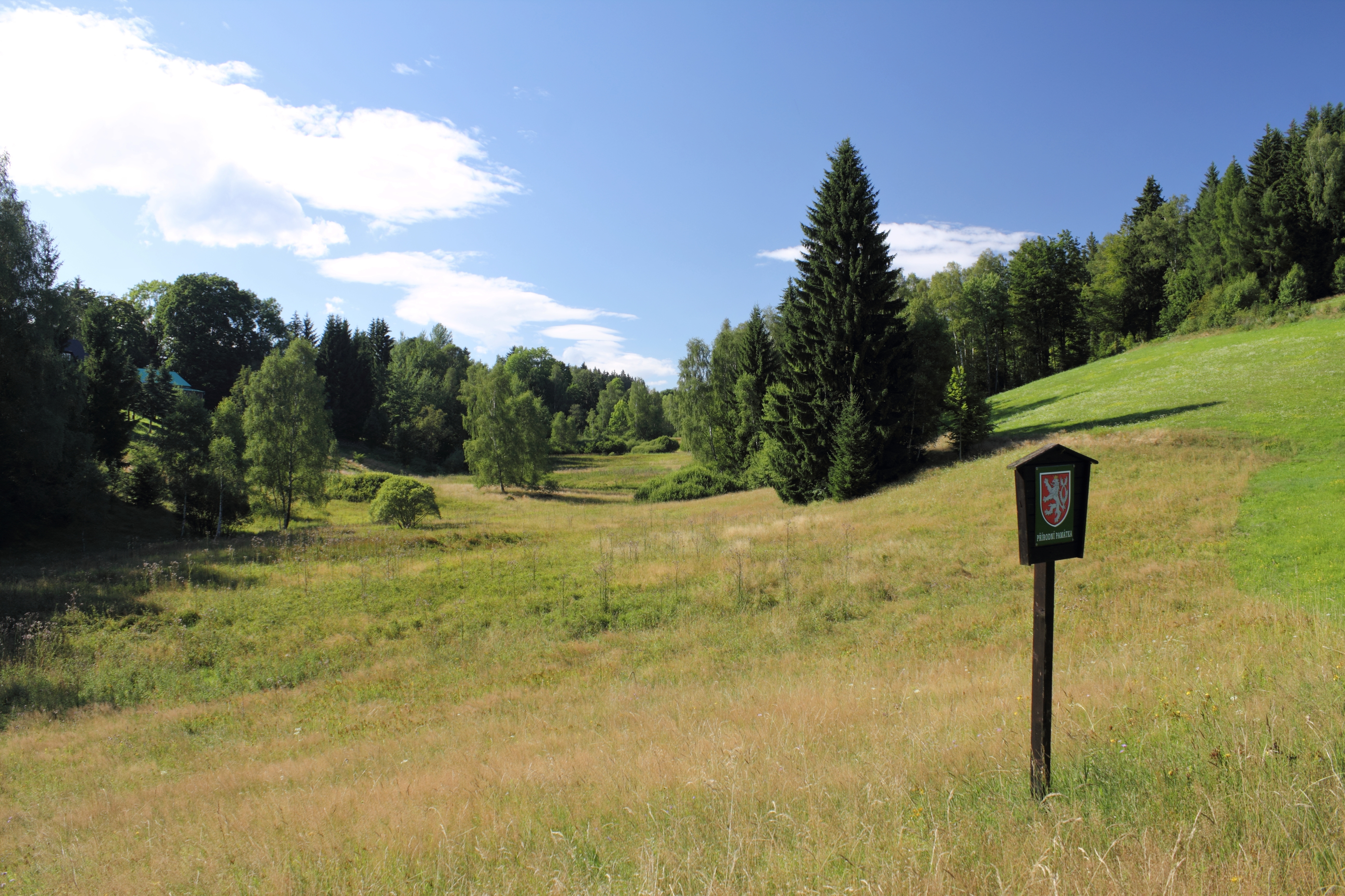 Jindřichovský mokřad